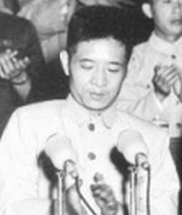 1953年胡耀邦朱德廖承志出席全国第二次青年团代表大会